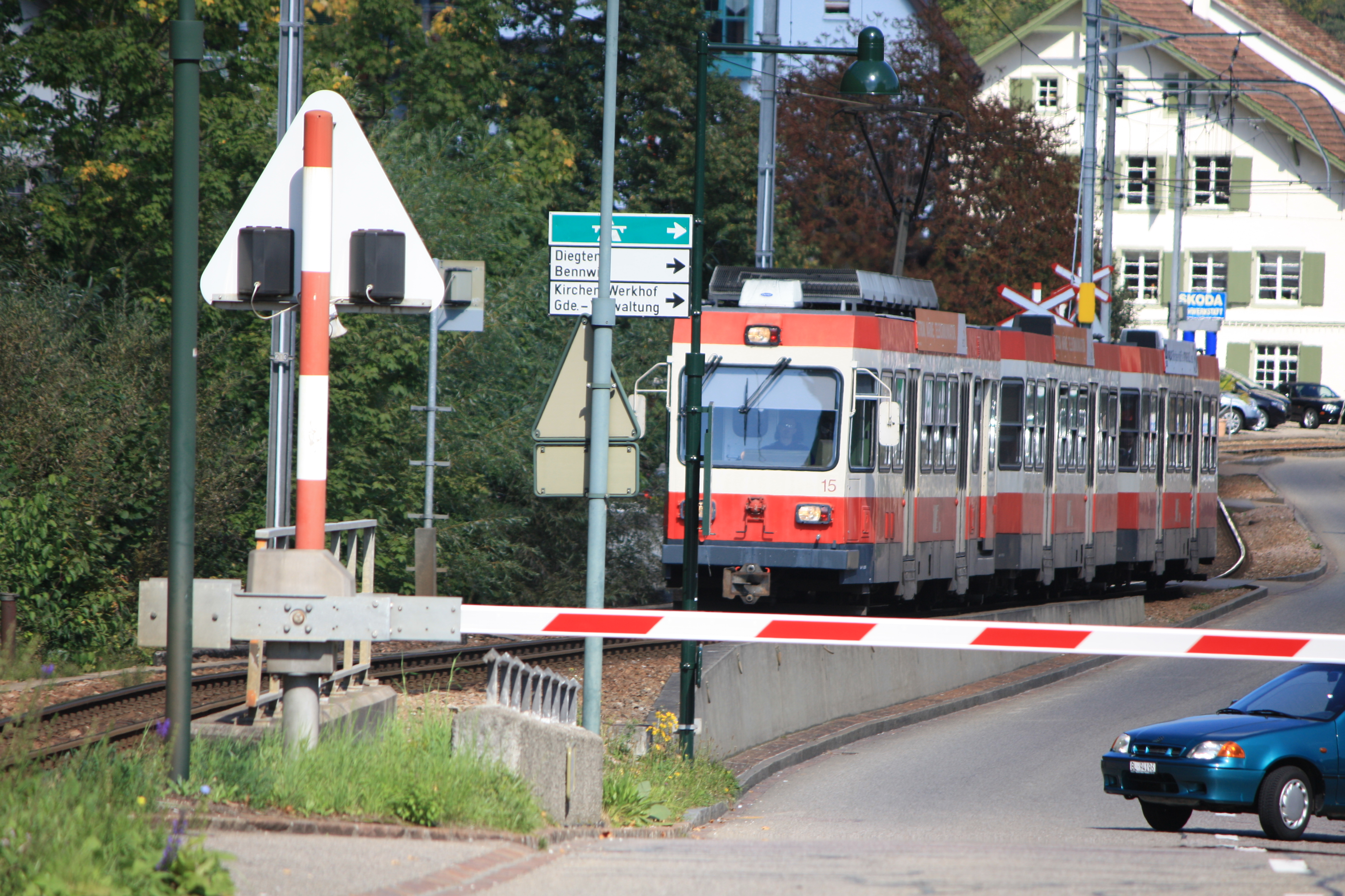 Die WB, BDe 4/4 und zwei Bt, in Hölstein